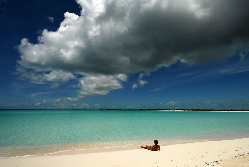 Cayo Largo, augustus 2006, info in de Metadata